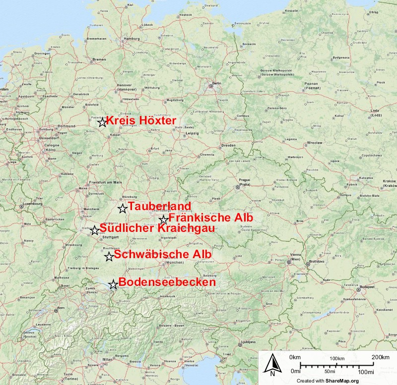 Verbreitungsschwerpunkte des Kreuzenzian-Ameisenbläulings in Deutschland. Datengrundlage: Siewers M. (2009). Der Kreuzenzian-Ameisenbläuling (Maculinea rebeli) Zur Situation und Entwicklung der Vorkommen im Kreis Höxter im Zeitraum von 1990 bis 2008. Beiträge zur Naturkunde zwischen Egge und Weser 21 (2009), 3-14.